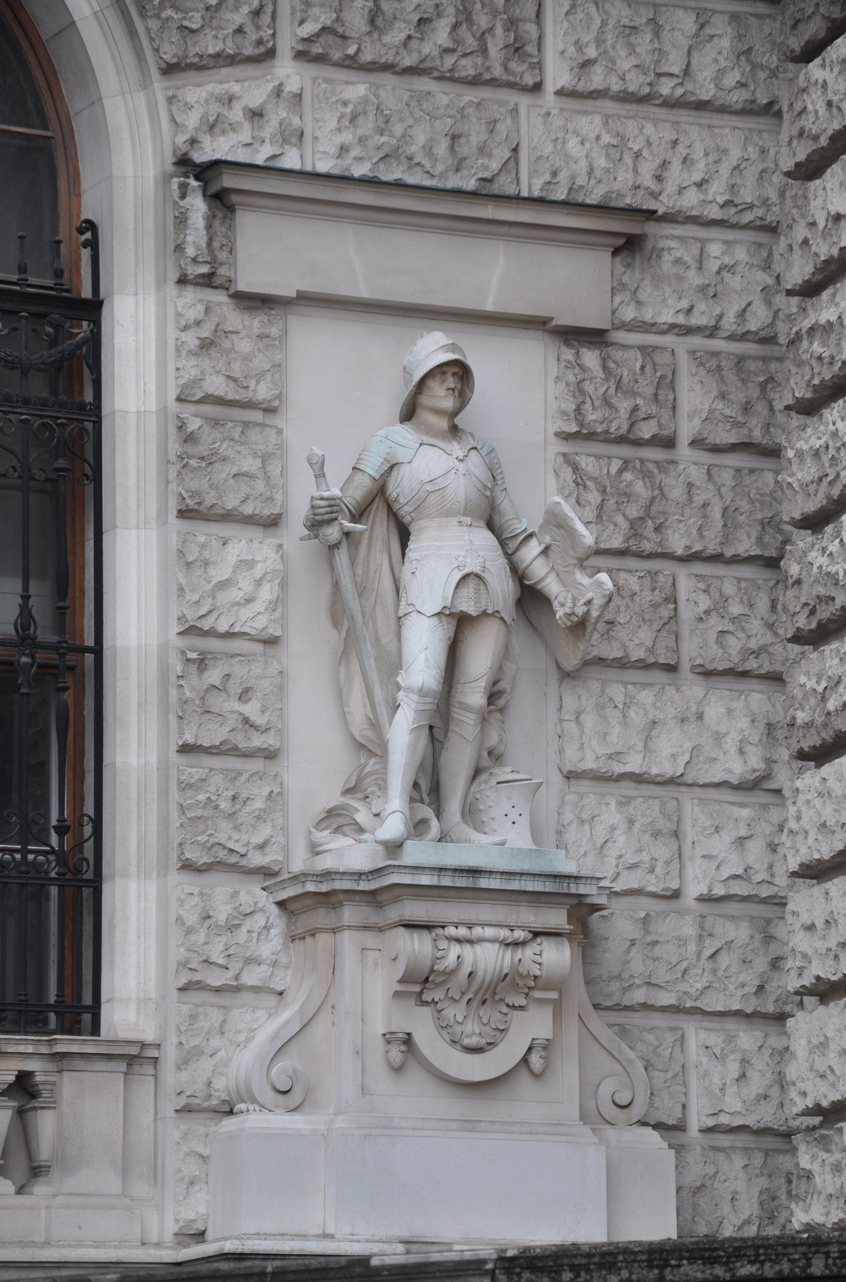 Wien, Neue Burg, Statuen an der Hauptfassade am Heldenplatz, zwanzig Gestalten der österreichischen Geschichte (verschiedene Bildhauer), 1895–1901 Nr. 10: Stefan Schwartz: Ritter